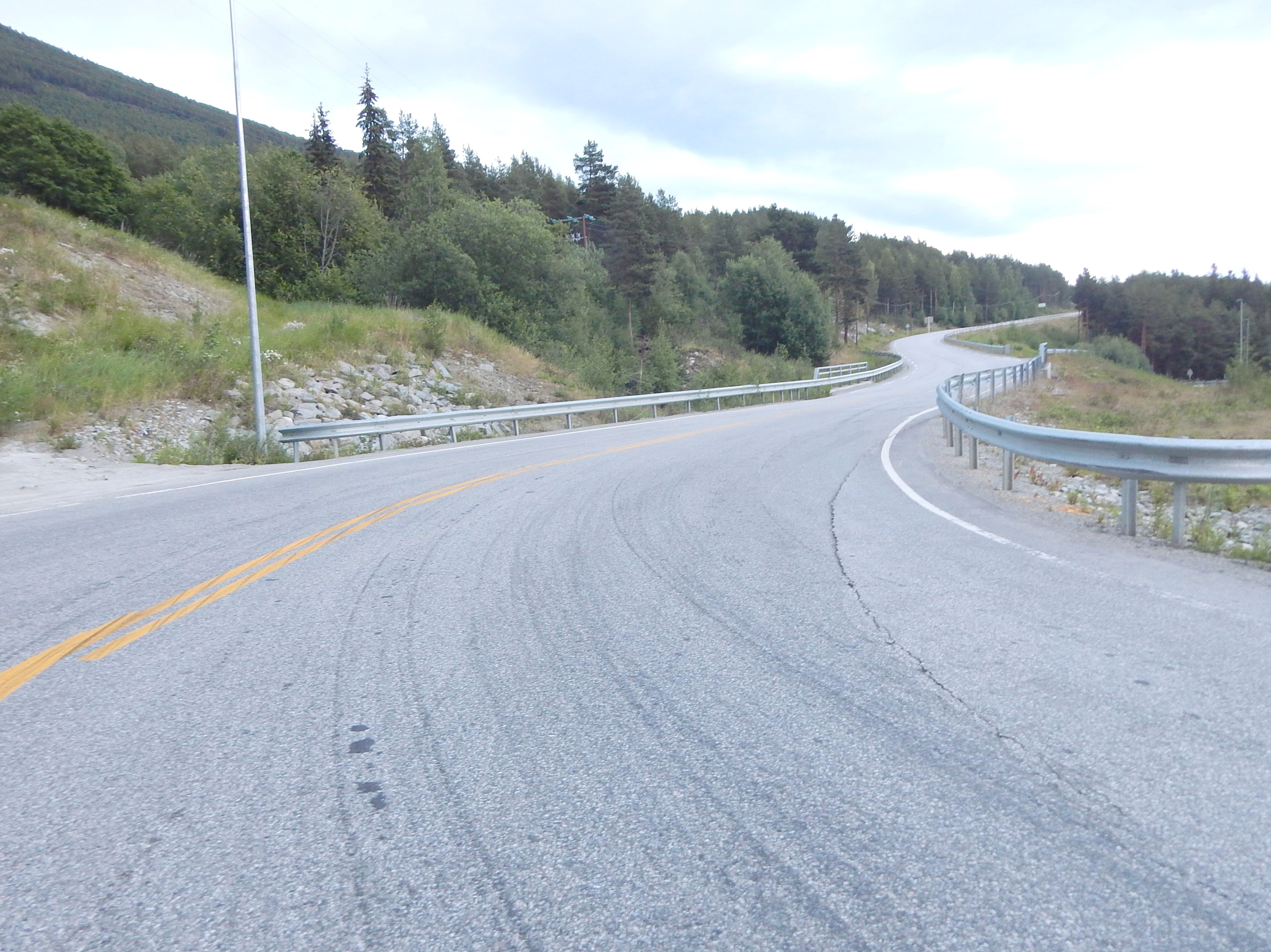 Vestenden av Rustvegen (fylkesvei 438), like ved riksvei 15